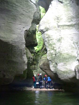 Canyon du Groin Photo Canyon du Groin, Jura, France, Juillet 2004 Jean Pavageau